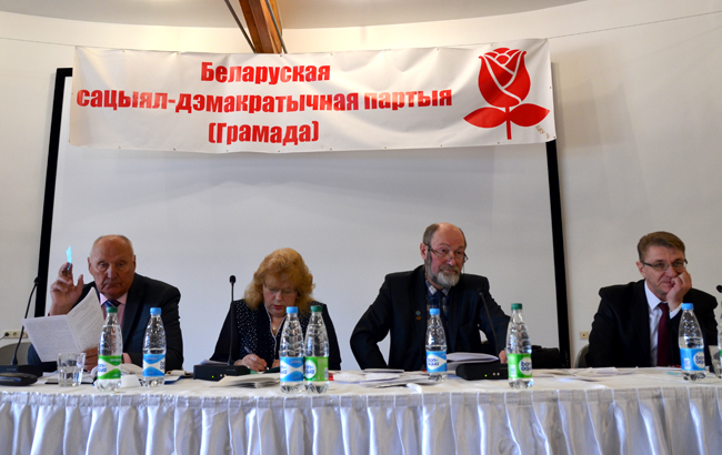 Беларуская (тарашкевіца): З'езд БСДП 13 сакавіка 2016 года